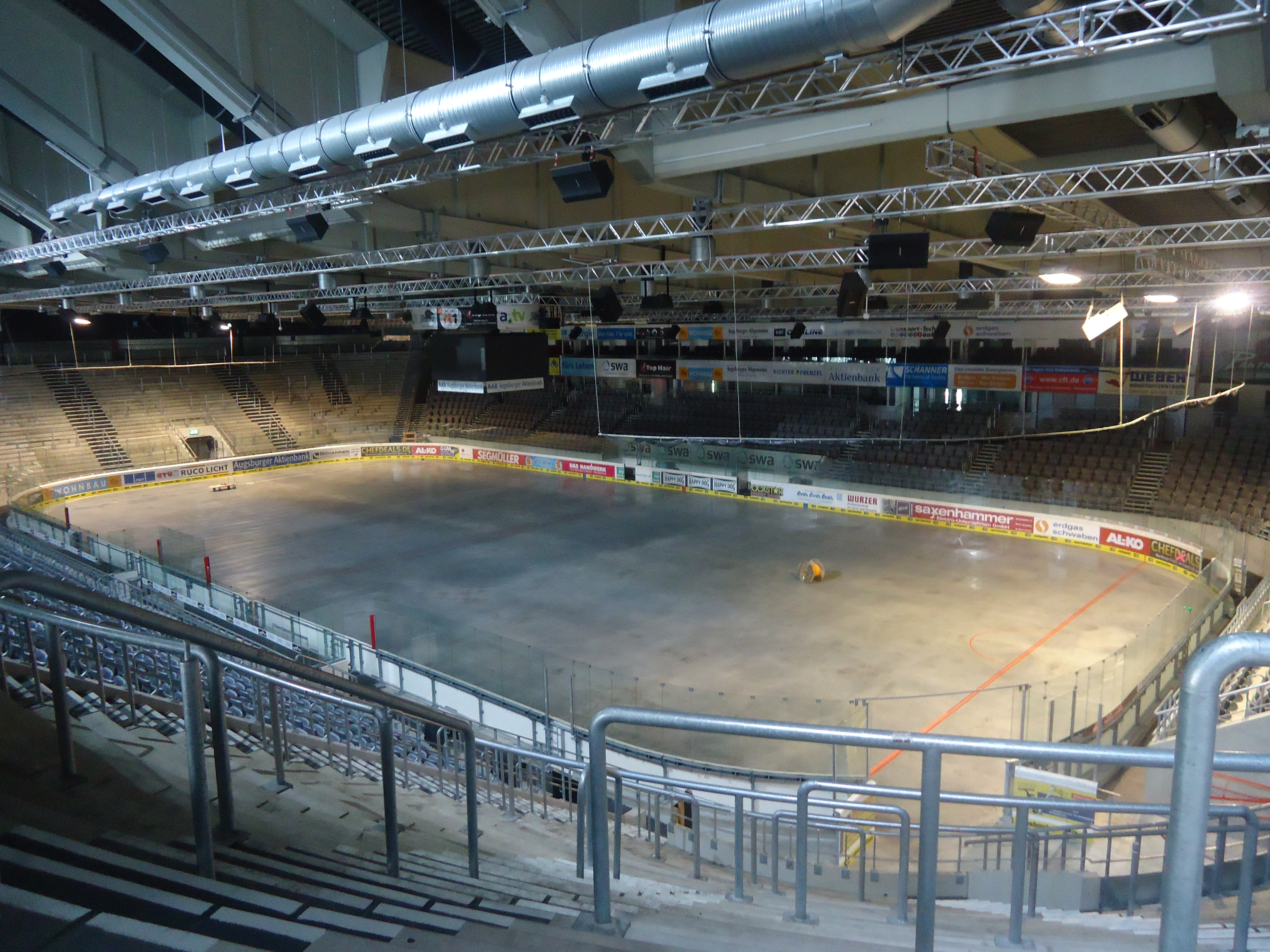 Curt Frenzel Stadion Innenansicht nach Umbau